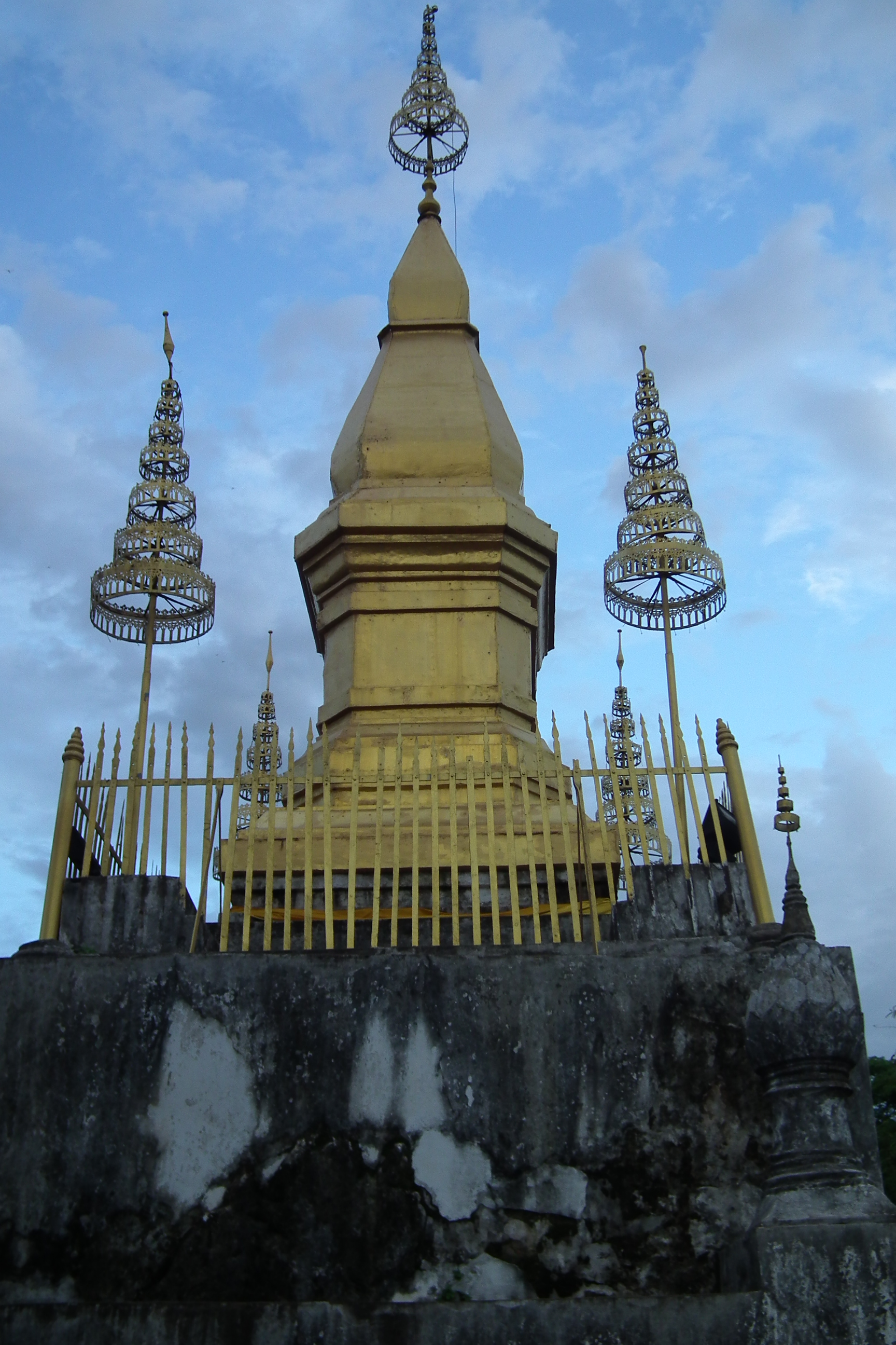 Phou si Luang Prabang Laos プーシーの丘 ラオス・ルアンプラバーン